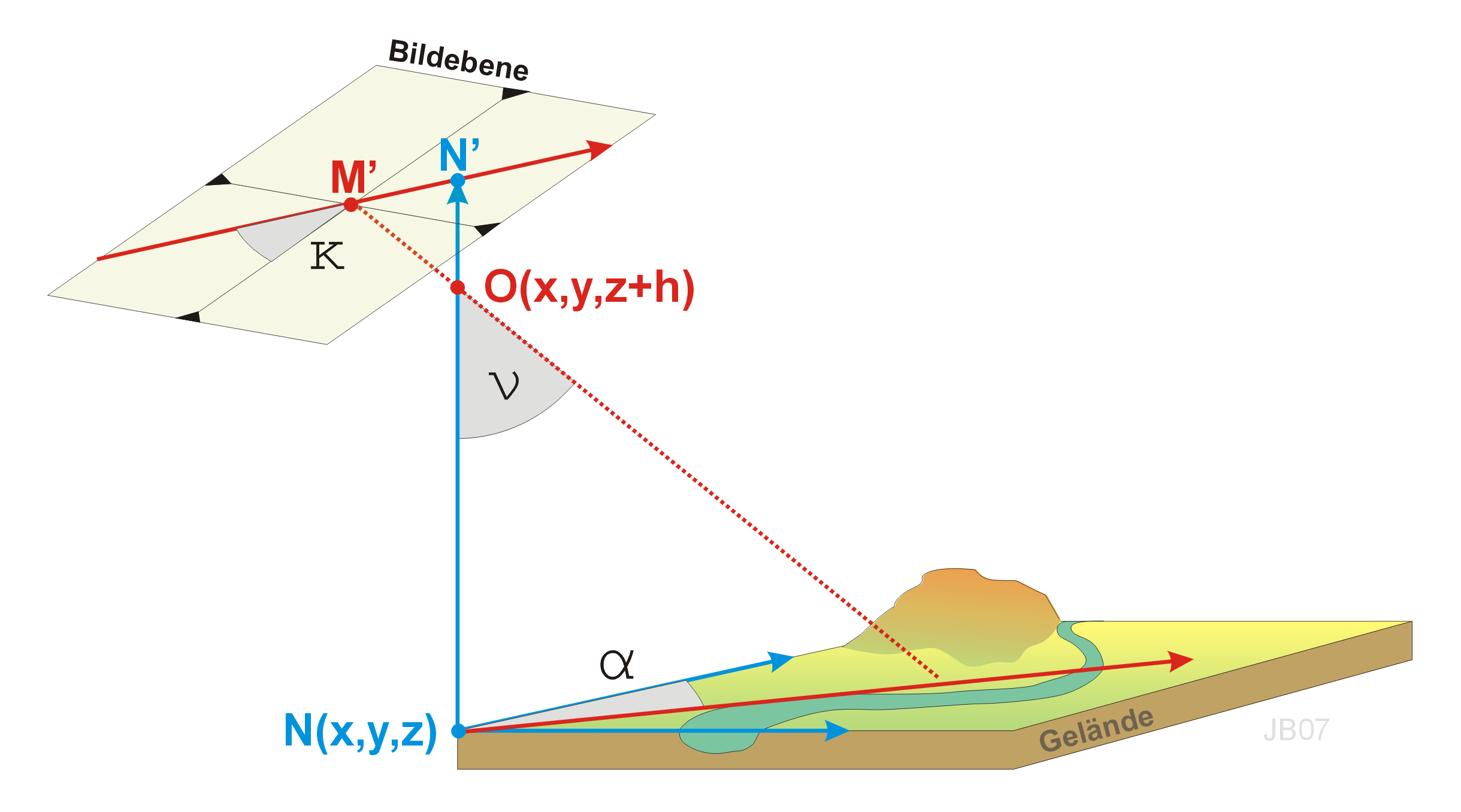 Parameter der äußeren Orientierung einer Aerophotogrammetrischen Aufnahme zur Rekonstruktion des Aufnahmestrahlenbündels